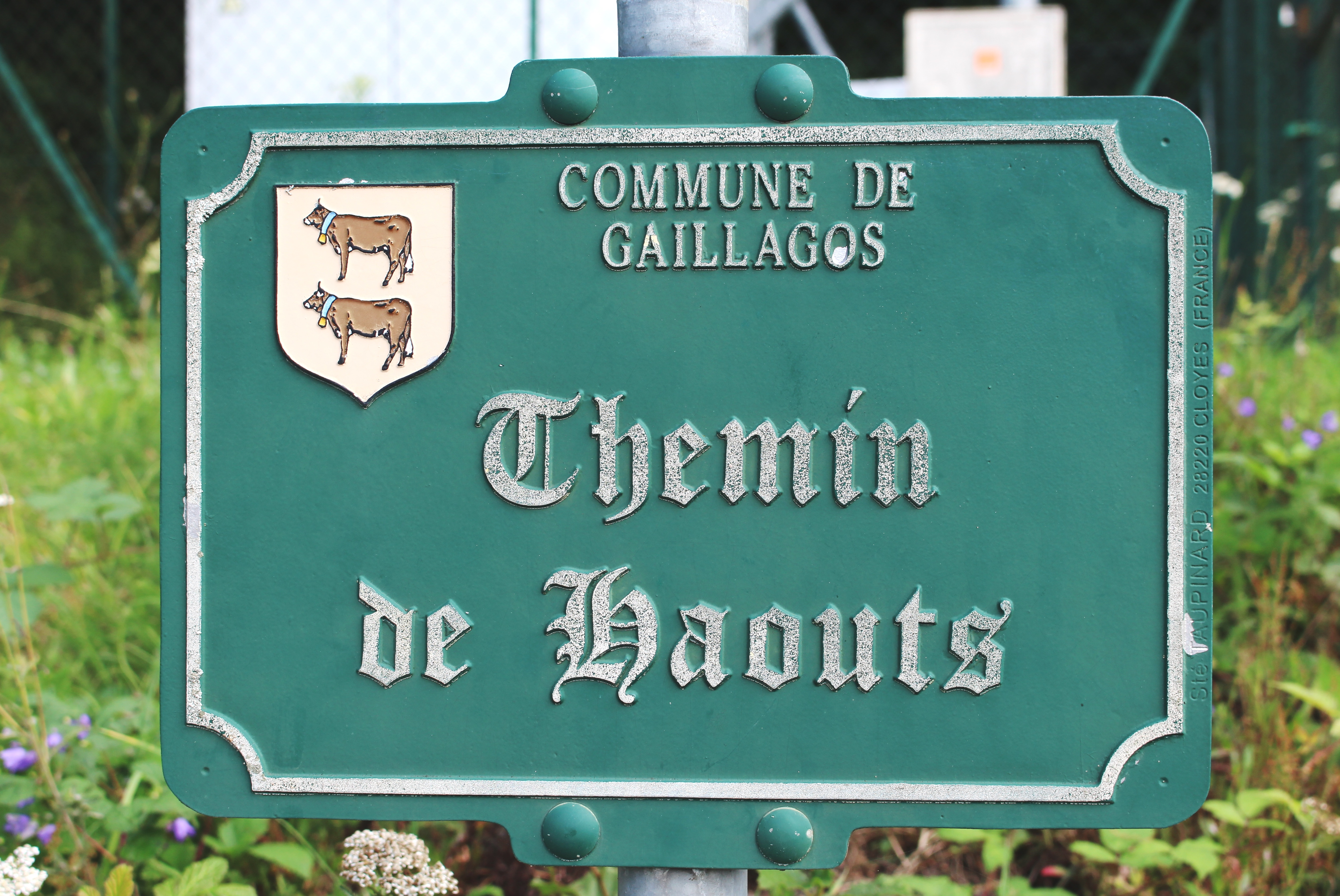 Gaillagos (Hautes-Pyrénées)